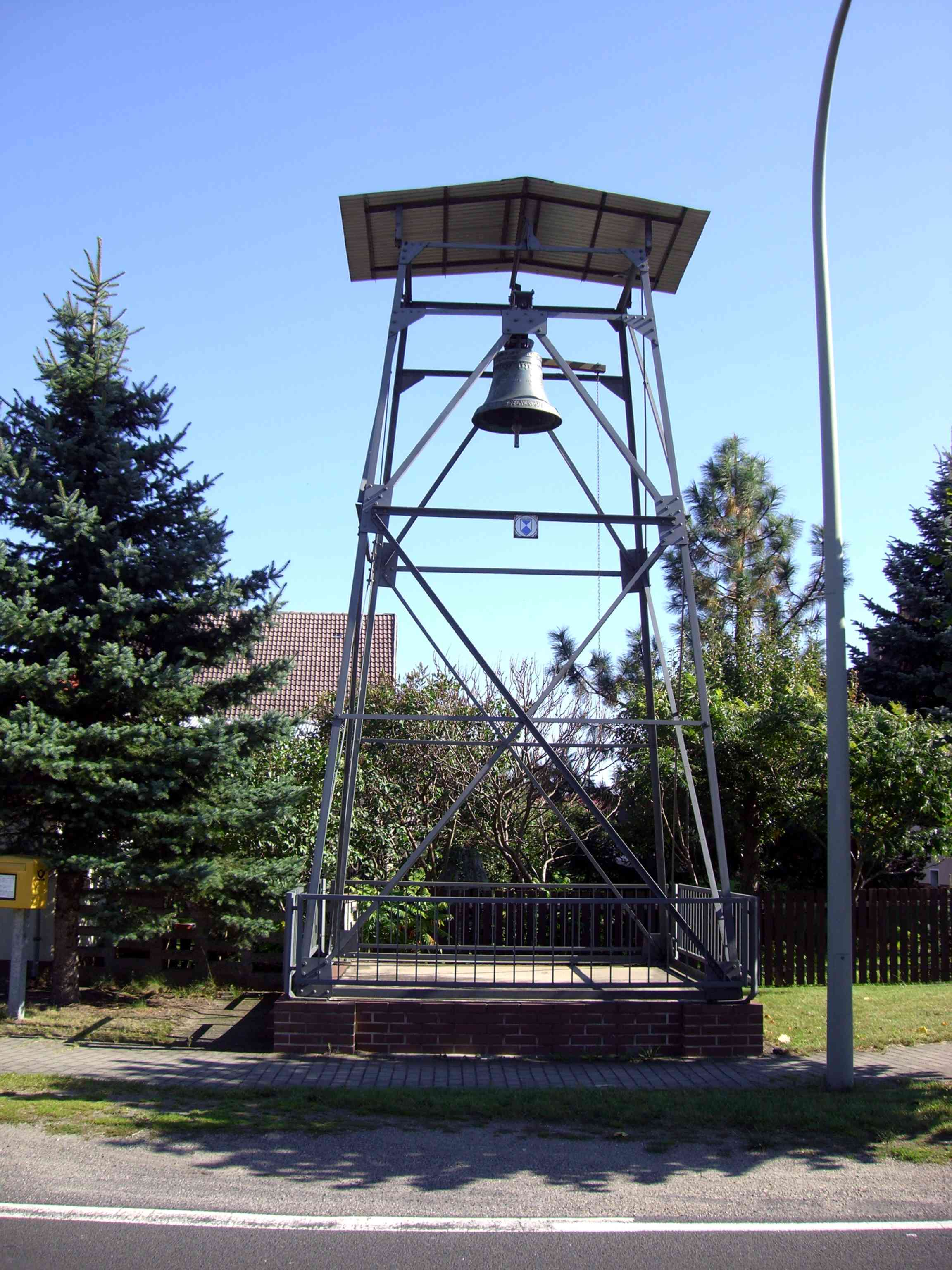 Glockenturm in Reichenhain, Deutschland.